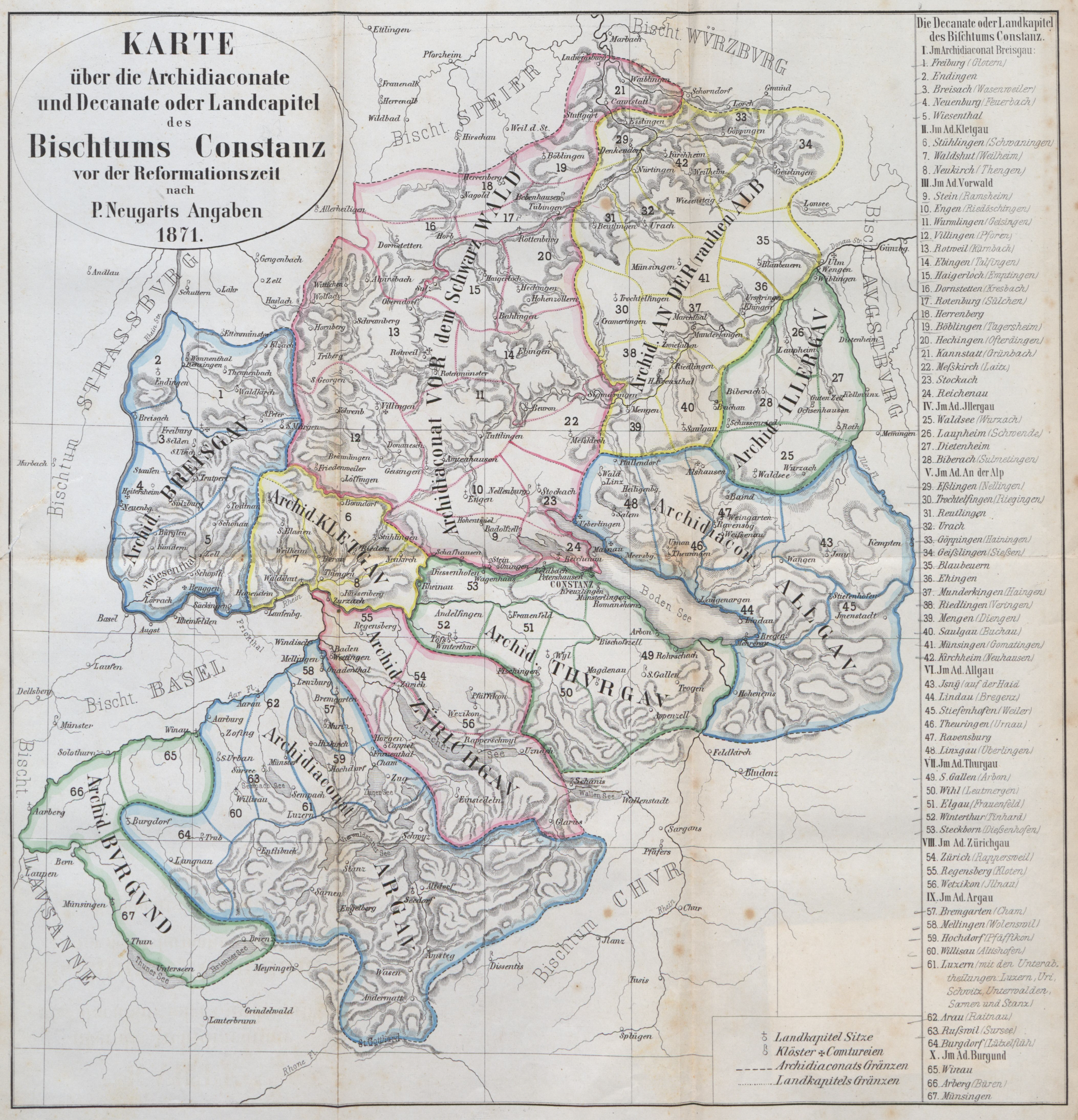 Karte über die Archidiaconate und Decanate oder Landcapitel des Bischtums Constanz vor der Reformationszeit nach P. Neugarts Angaben 1871, in: Freiburger Diöcesan-Archiv, Band 6 (1871) Karte der Archidiakonate und Landkapitel des Bistums Konstanz, nach den Angaben von Trudpert Neugart in seiner Dissertatio de partitione territorii Constantiensis ecclesiastica in archidiaconatus et decanatus rurales.